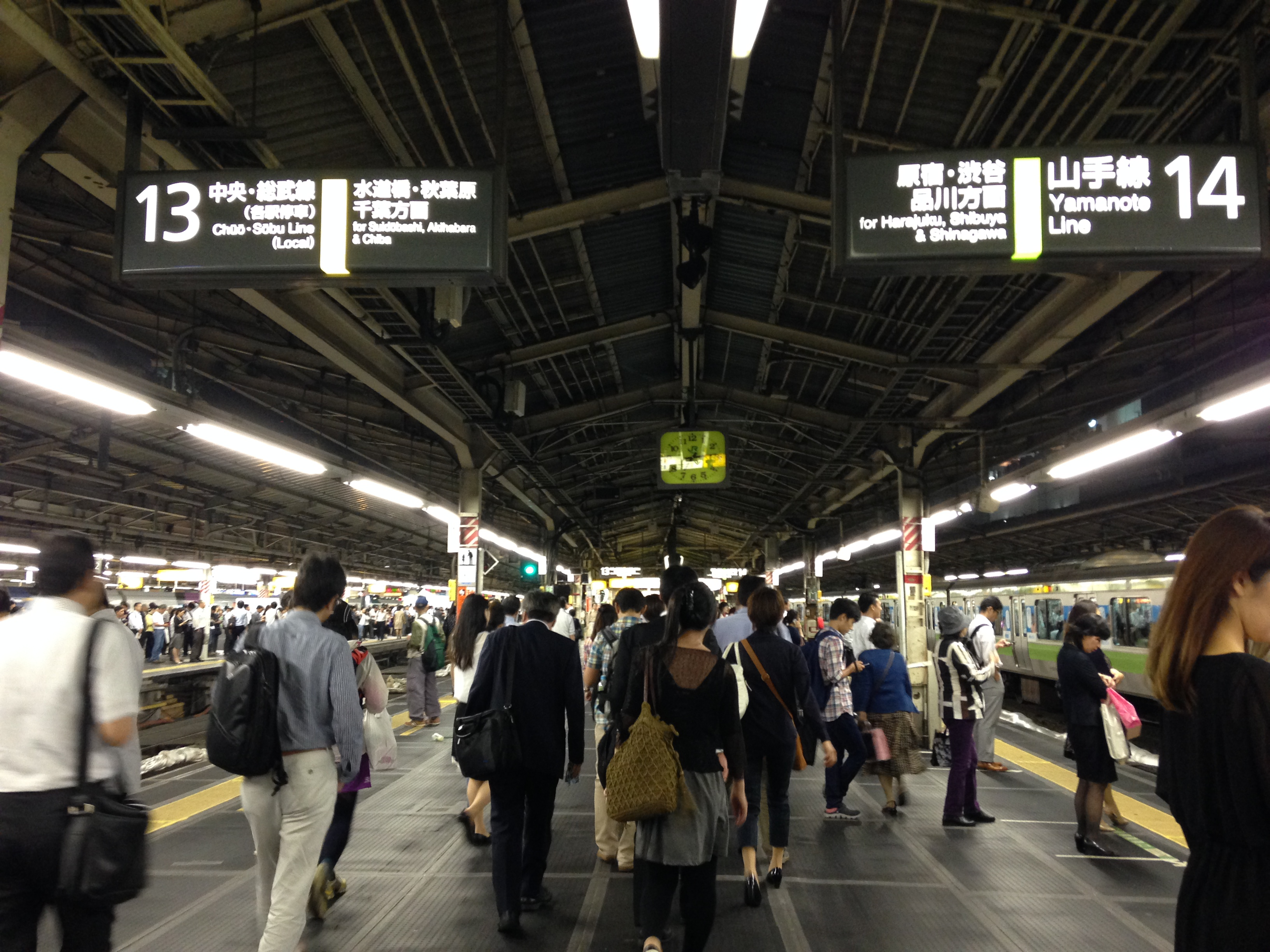 新宿駅(中央総武線・山手線)のホーム